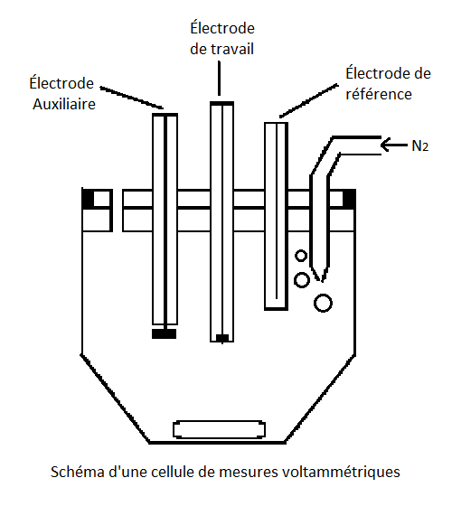 Schéma complet d'une cellule de mesures voltammétriques utilisée en polarographie.